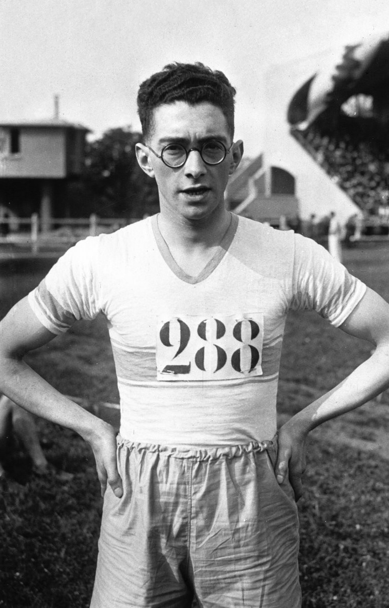 Stade Jean Bouin : Alzieu, saut en longueur (portrait à 2 m) : [photographie de presse] / Agence Meurisse